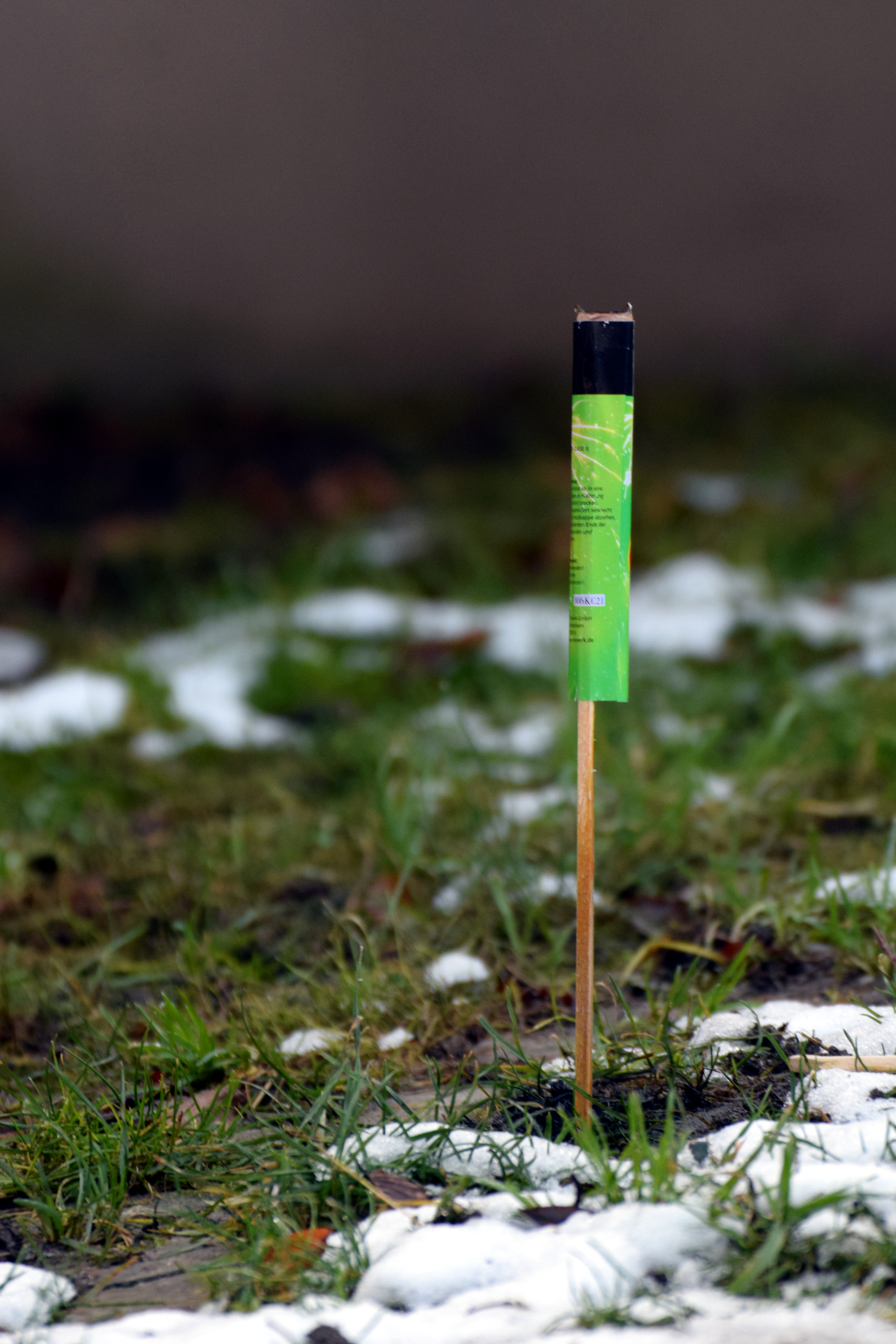 Une fusée planté dans le sol avant d'être allumée